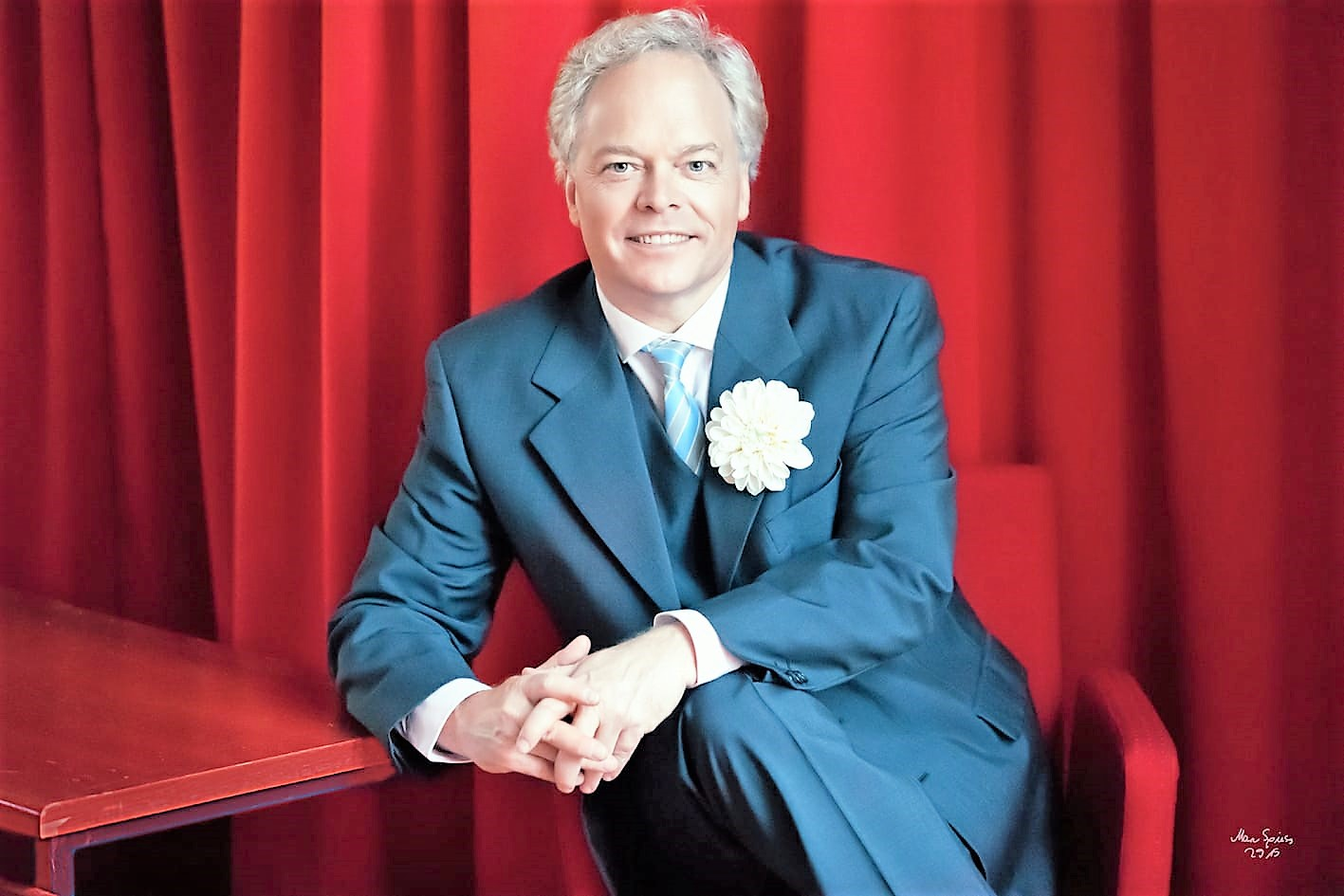 Portrait Heiko Reissig ©Heiko Reissig